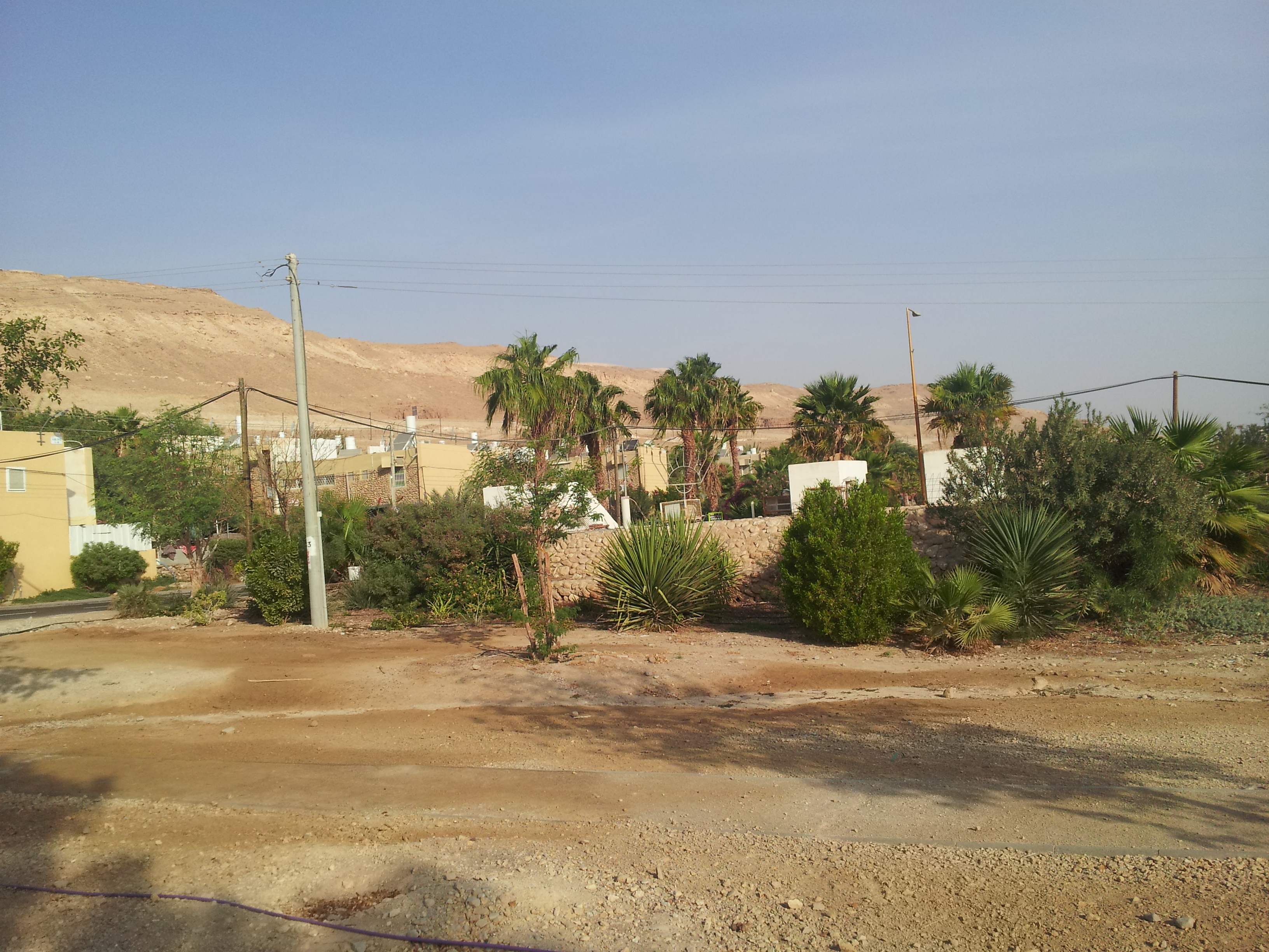 בתי היישוב